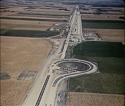 Überblick über die Teststrecke des AASHO Road Test Areal nach Abschluss der Versuche